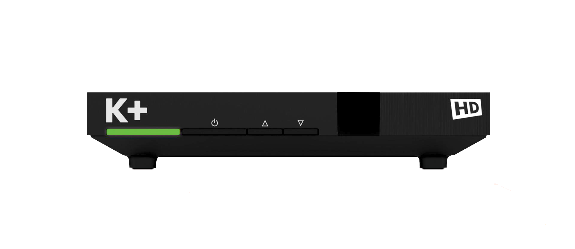 K+ TECHNICOLOR SET-TOP BOX_1